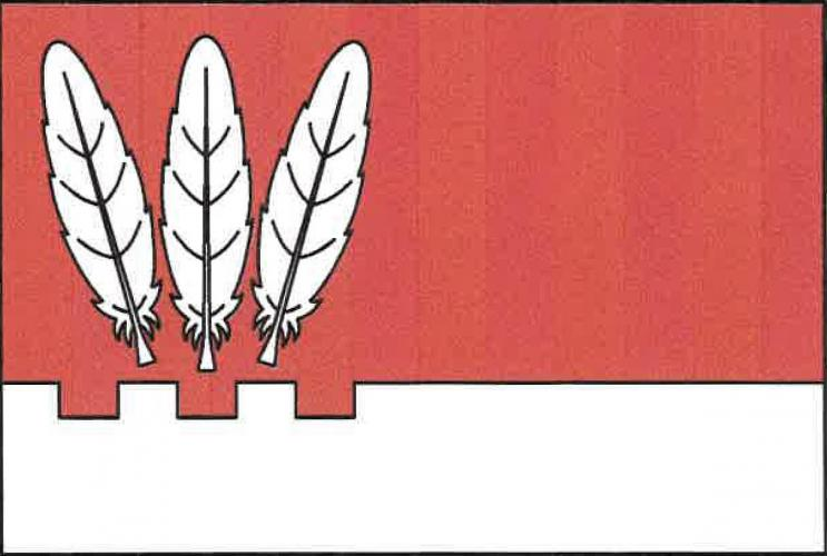 Pyšel vlajka